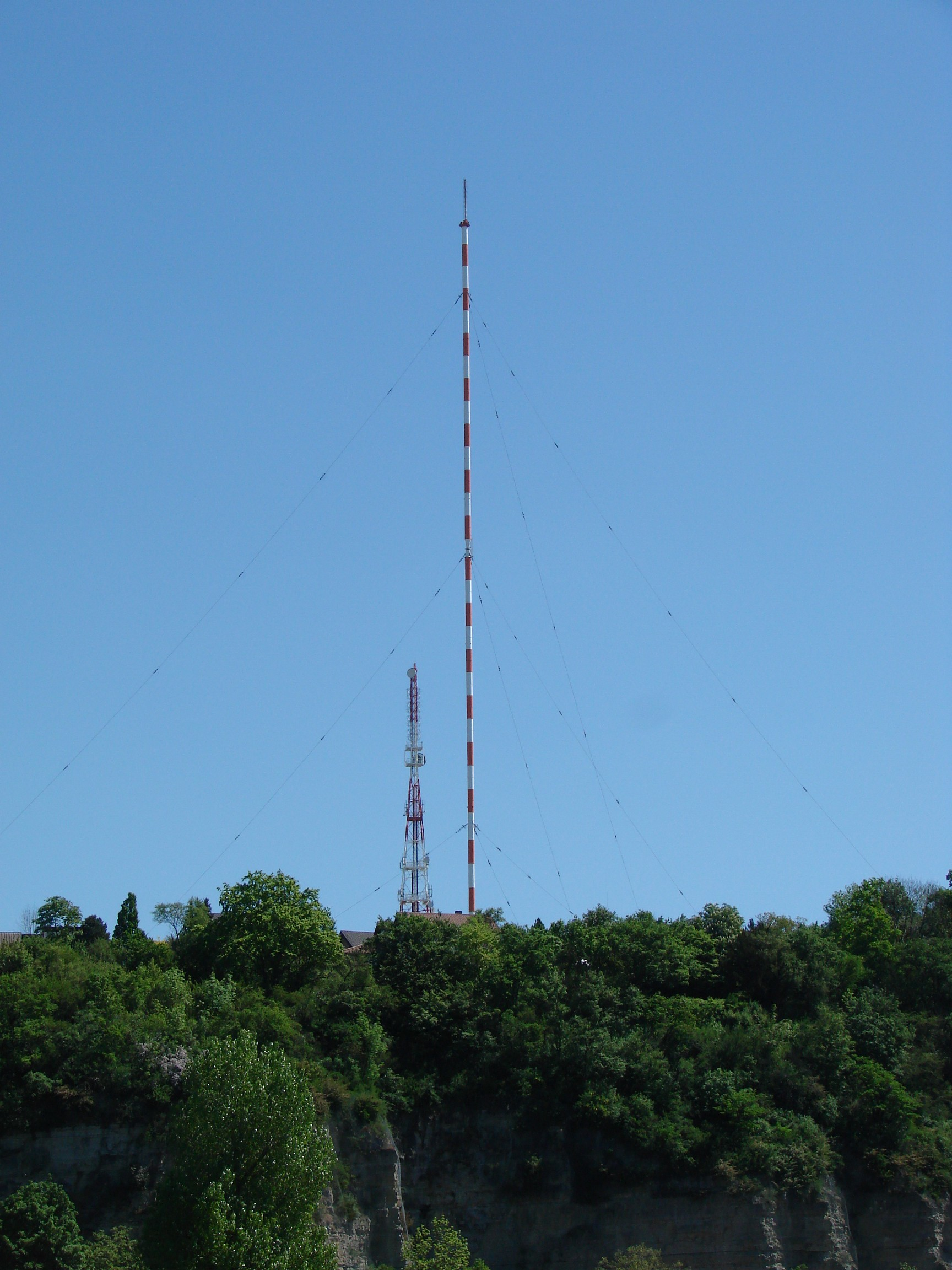 Mühlacker, radio transmitter